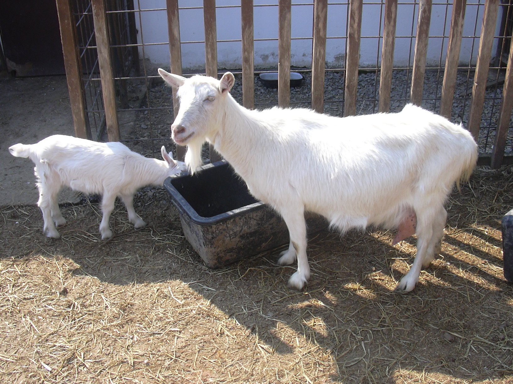 koza domácí (zoo Vyškov- czech republic)